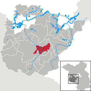 Brück in Brandenburg (Country) - District Potsdam-Mittelmark